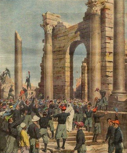 Exemple de l'imagerie de propagande fasciste récupérant les traditions de la Goliardia : des étudiants italiens portant la feluca et visitant la Tripolitaine entonnent des chansons à la gloire du fascisme et de Mussolini. Texte d'accompagnement de l'illustration : « La visita degli studenti universitari in Tripolitania. Tra le vestigia della civilta romana in Africa, i goliardi innalzano i canti dell'Italia nuova e inneggiano al Duce. » La visite des étudiants universitaires en Tripolitaine. Au milieu des vestiges de la civilisation romaine en Afrique, les goliards entonnent les chants de l'Italie nouvelle et louangent le Duce.